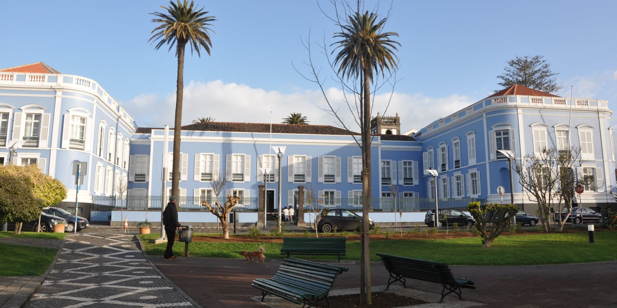 Largo 2 de Março, Ponta Delgada